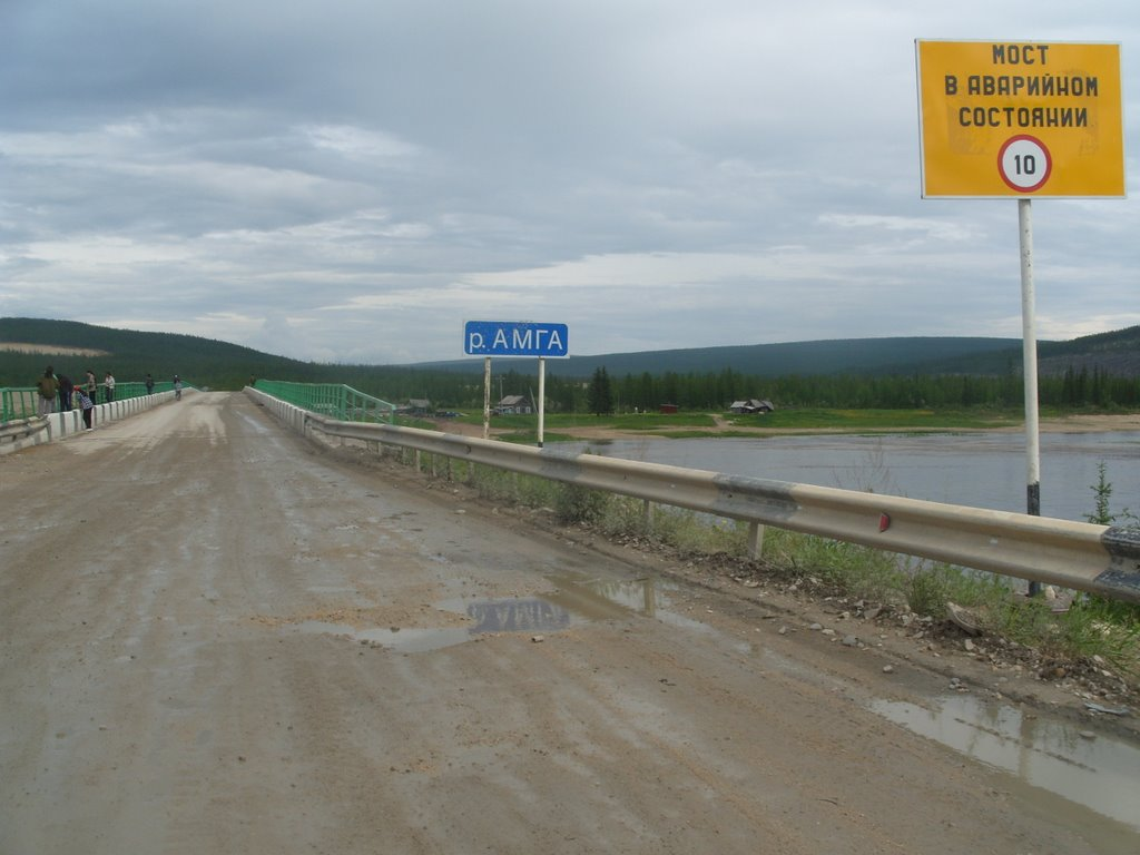 Верхняя Амга, Якутия. Автомобильный мост через р. Амга